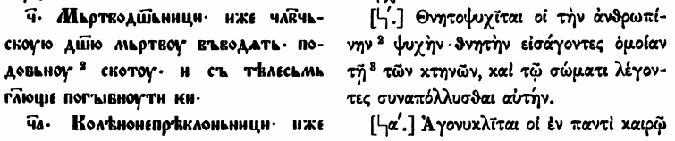 Мьртводѹшьници в книге Бенешевич В. Н. Древнеславянская кормчая XIV титулов без толкования. СПб, 1907.Т. 1.